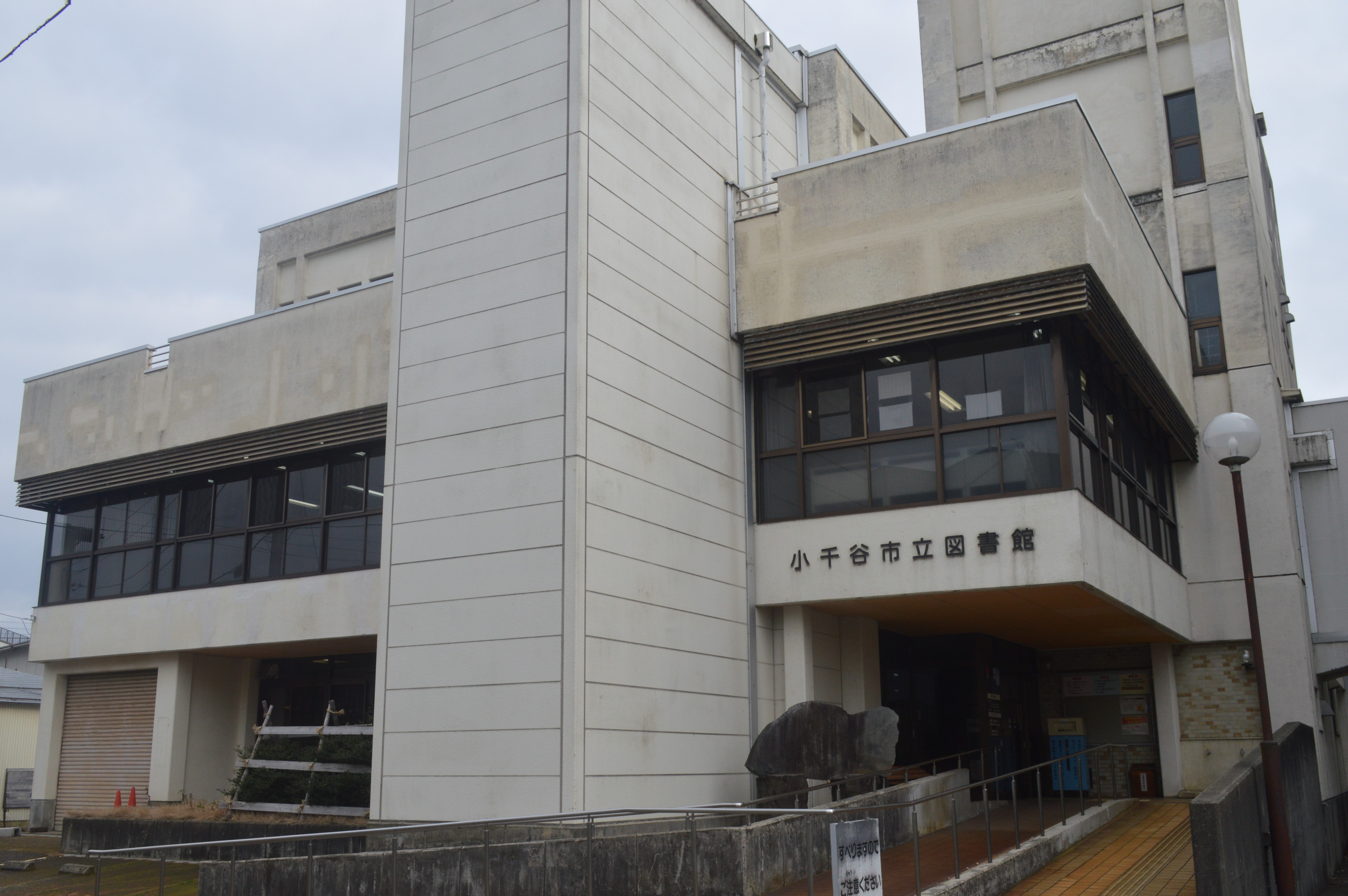 新潟県小千谷市土川1丁目3-7にある小千谷市立図書館。